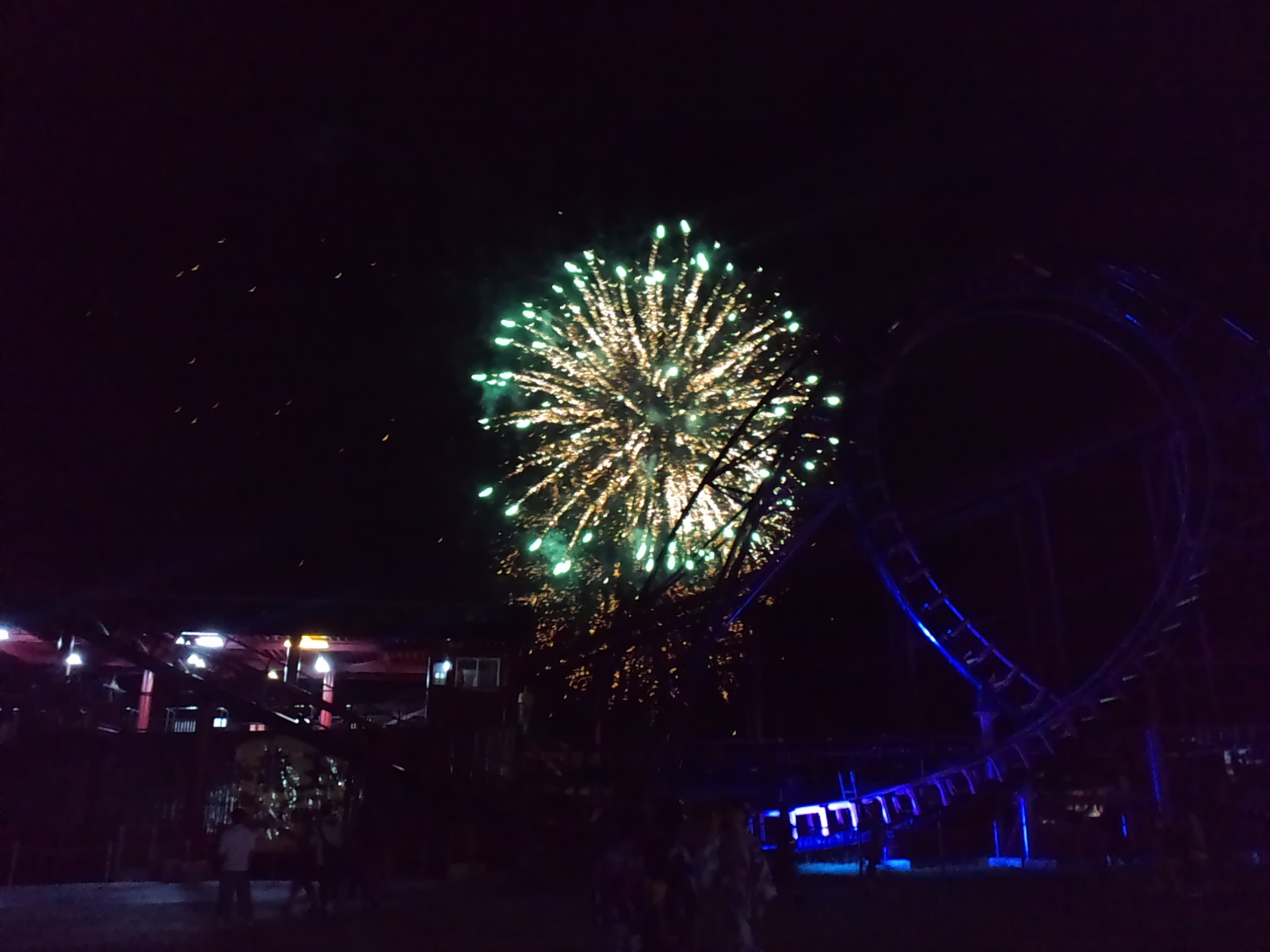 いわみざわ公園花火大会2014